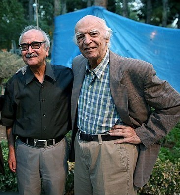 نجف دریابندری و محمدرضا شفیعی کدکنی در مراسم بزرگداشت محمد زهرایی مدیر نشر کارنامه، فرهنگسرای نیاوران